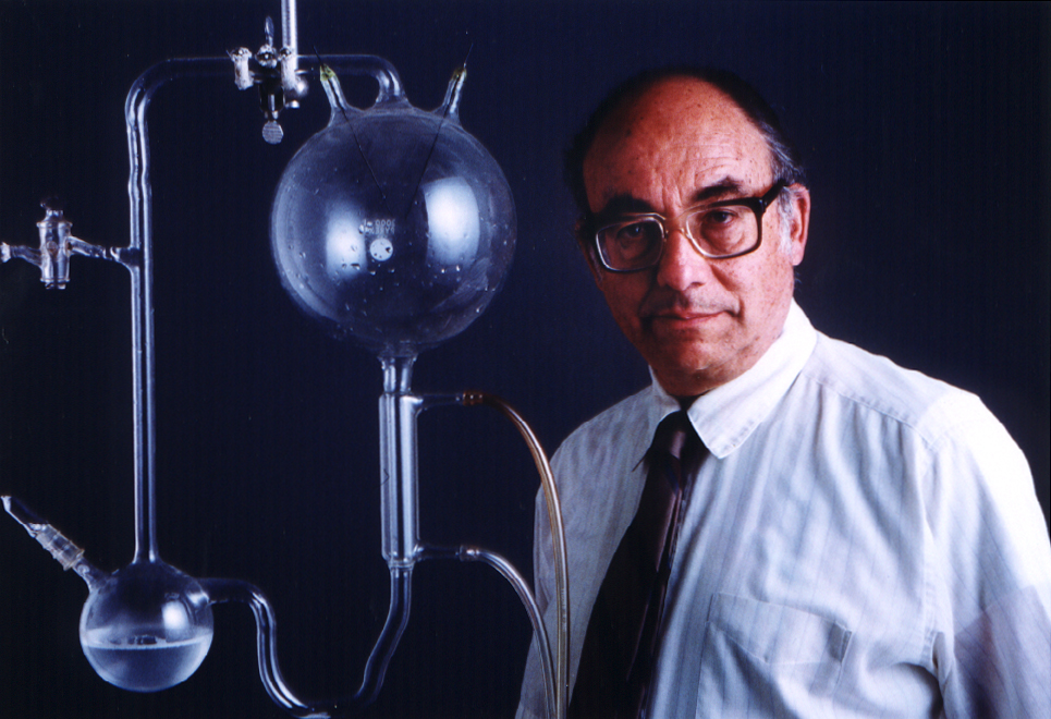 Stanley Miller